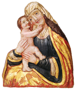 Milostný obraz Panny Marie v Křešicích u Litoměřic, kolem roku 1600